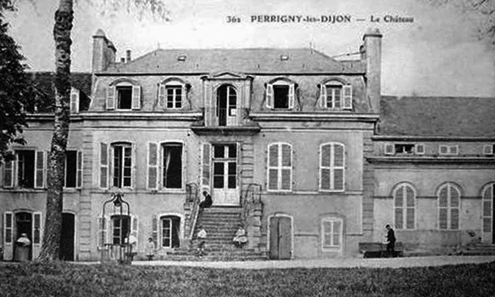 Maison Joliet